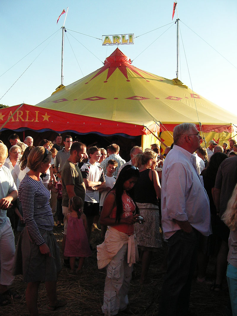 Cirkus Arli, Rågeleje 16-07-2006